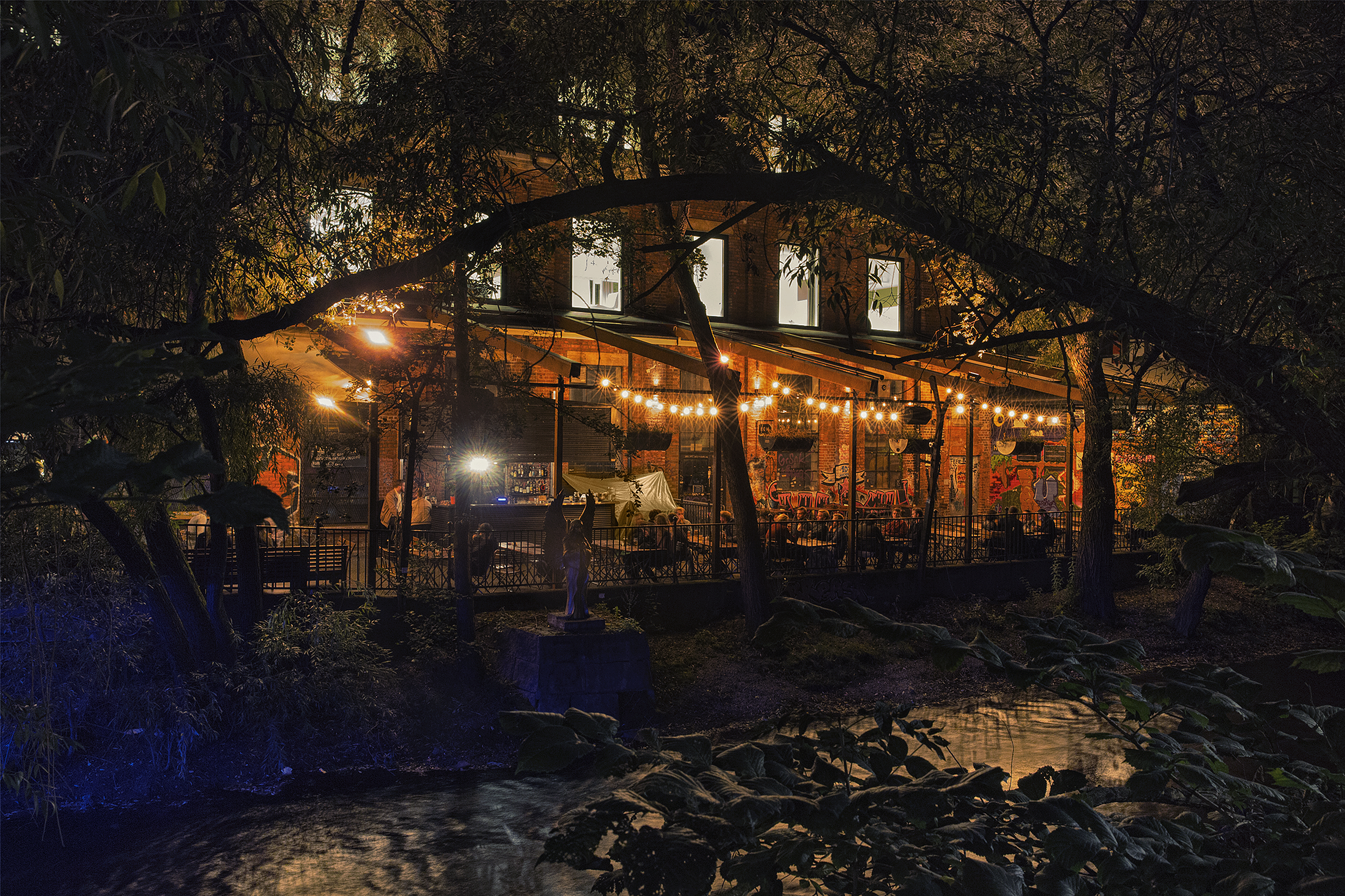 Foto av Julie Marie Naglestad